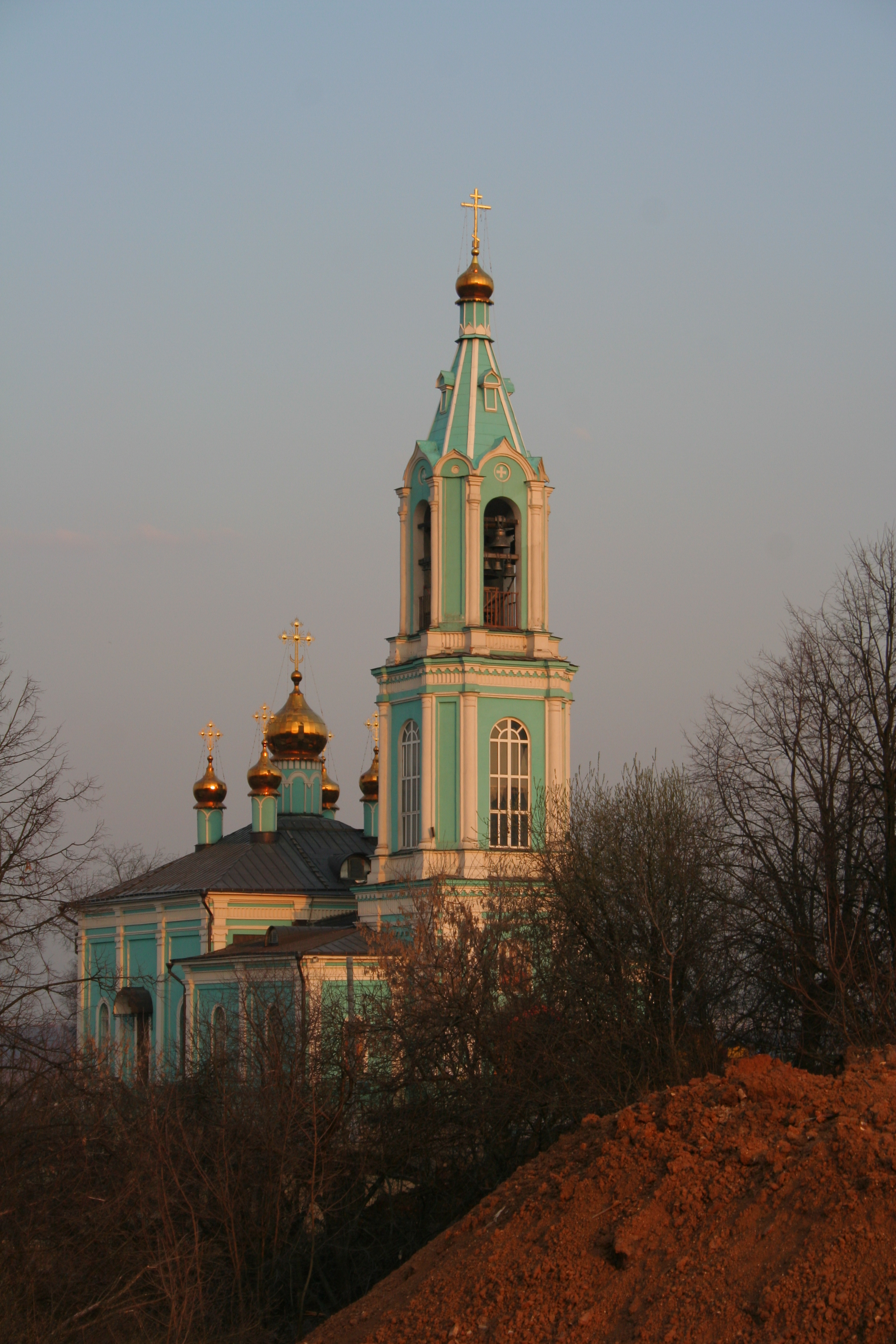 Mariä-Geburts-Kirche in Krylatskoje, Moskau